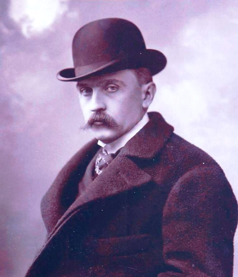 Aggházy Károly zongoraművész, Liszt Ferenc növendéke, Hubay Jenő kamarapartnere, 1881-1883 és 1889-1918 a Nemzeti Zenede nagy hírű zongoratanára